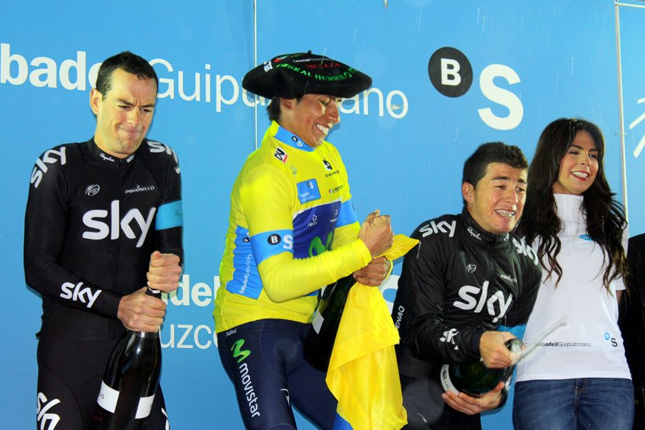 Podio final de la Vuelta al País Vasco 2013. Nairo Quintana, Richie Porte y Sergio Luis Henao